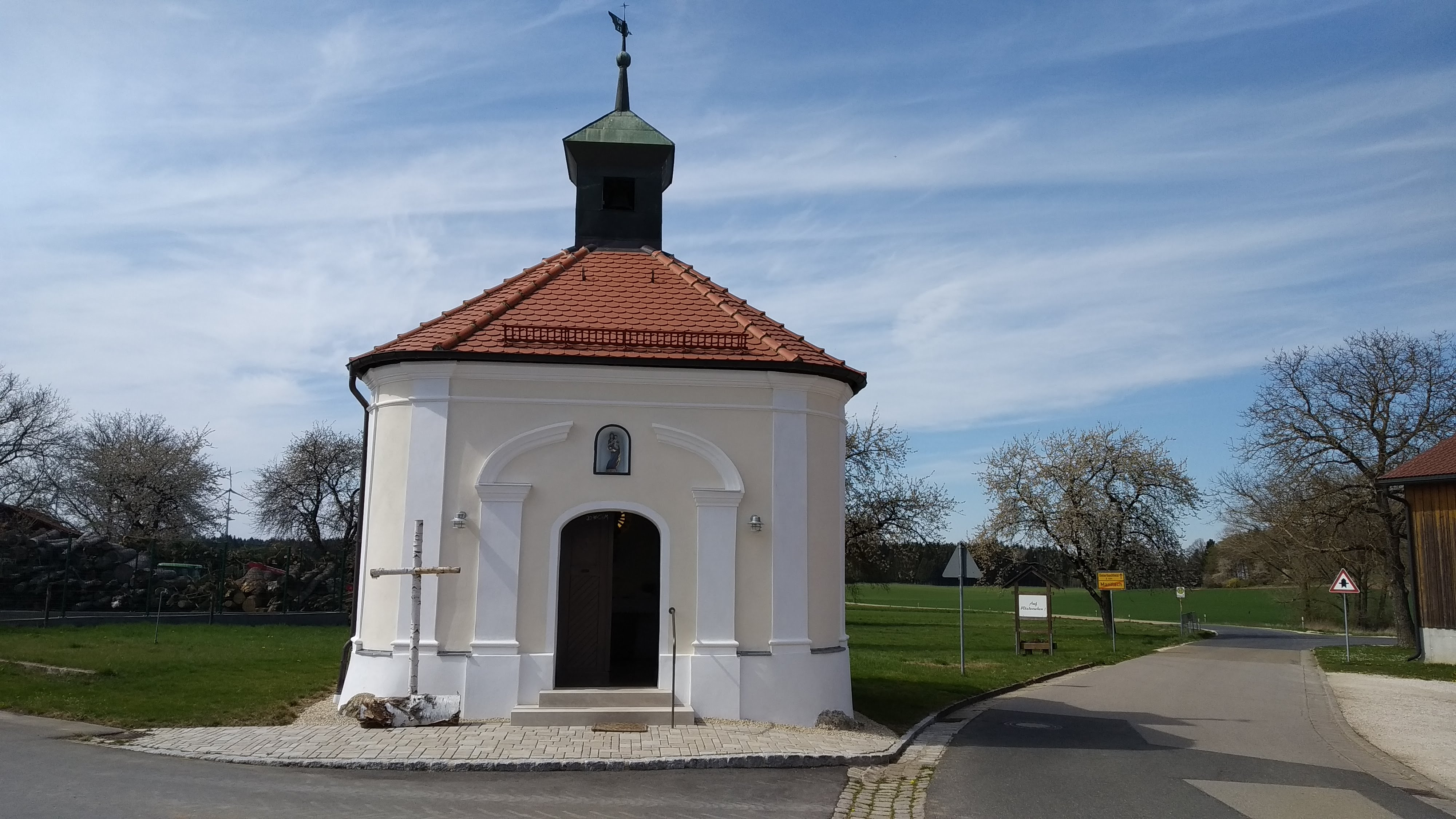 Dorfkapelle in Mantlach bei Velburg